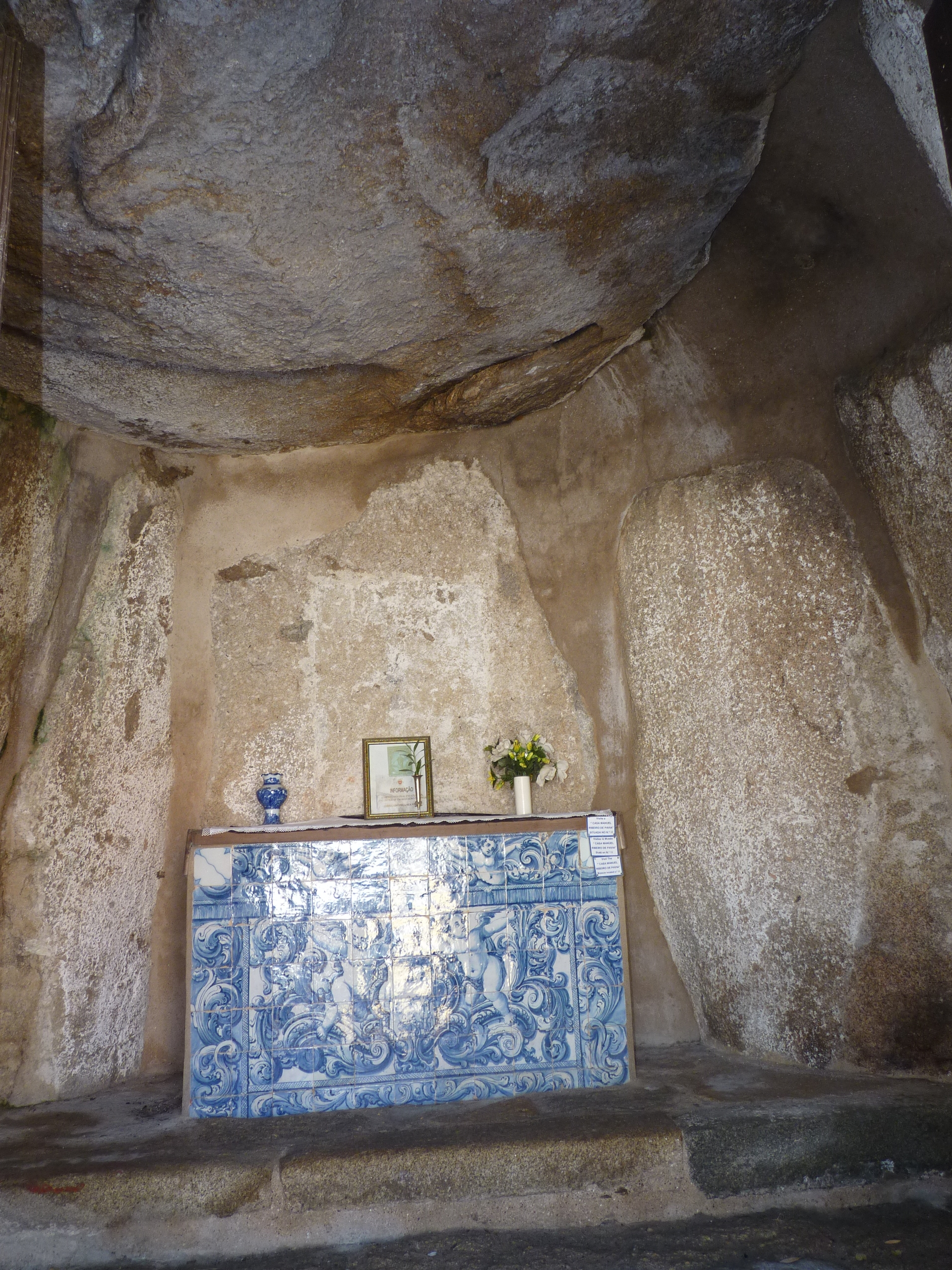 Anta de Pavia This file was uploaded for Wiki Loves Monuments in Portugal with the unique identifier 70422.